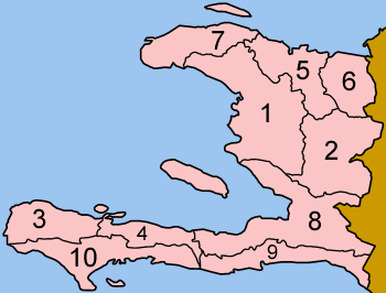 Mapa con los departamentos en orden alfabético. Map of the departments of Haiti in alphabetical order. Made by User:Golbez from PD sources.